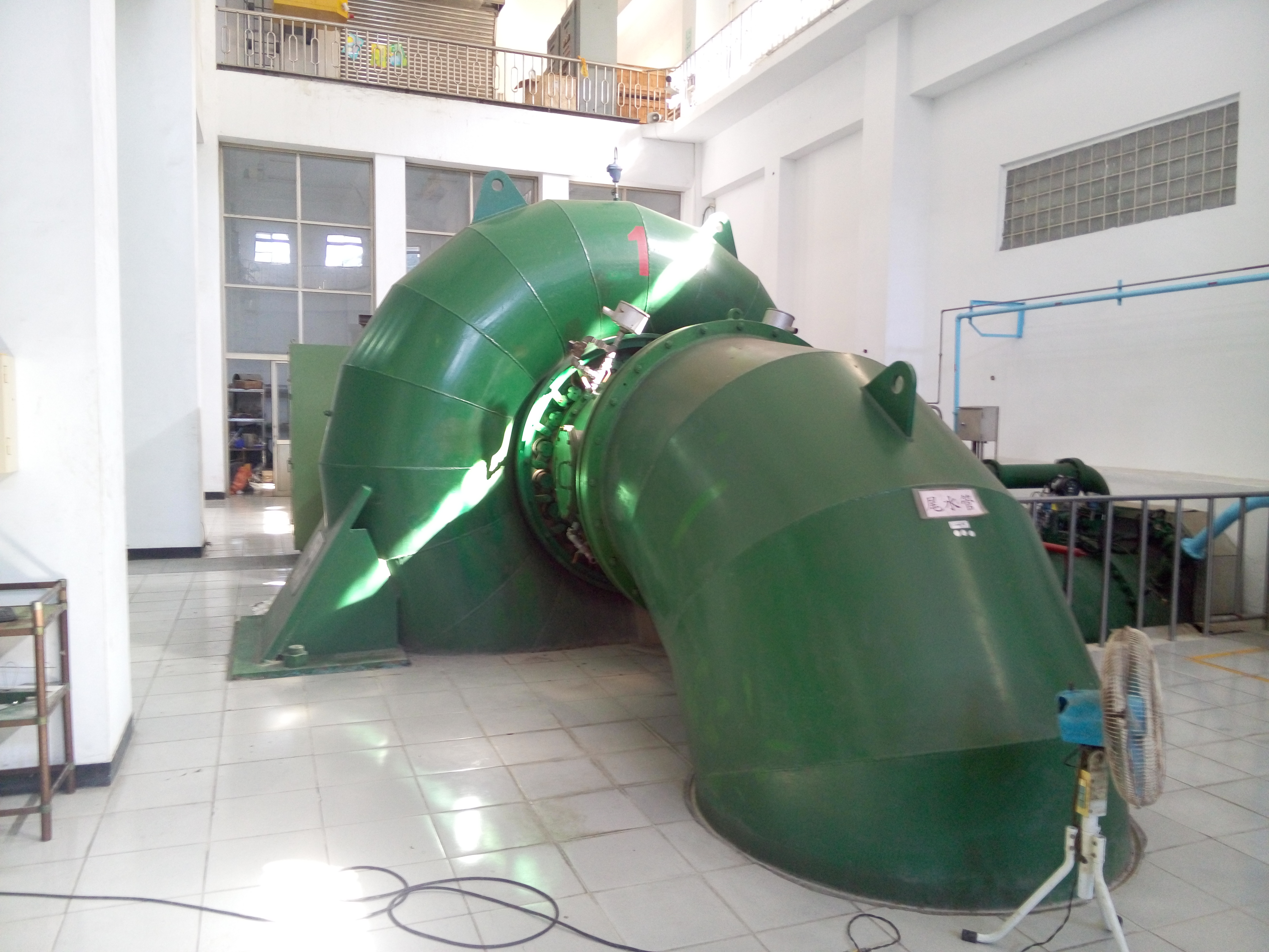 臺灣電力公司高屏發電廠六龜機組